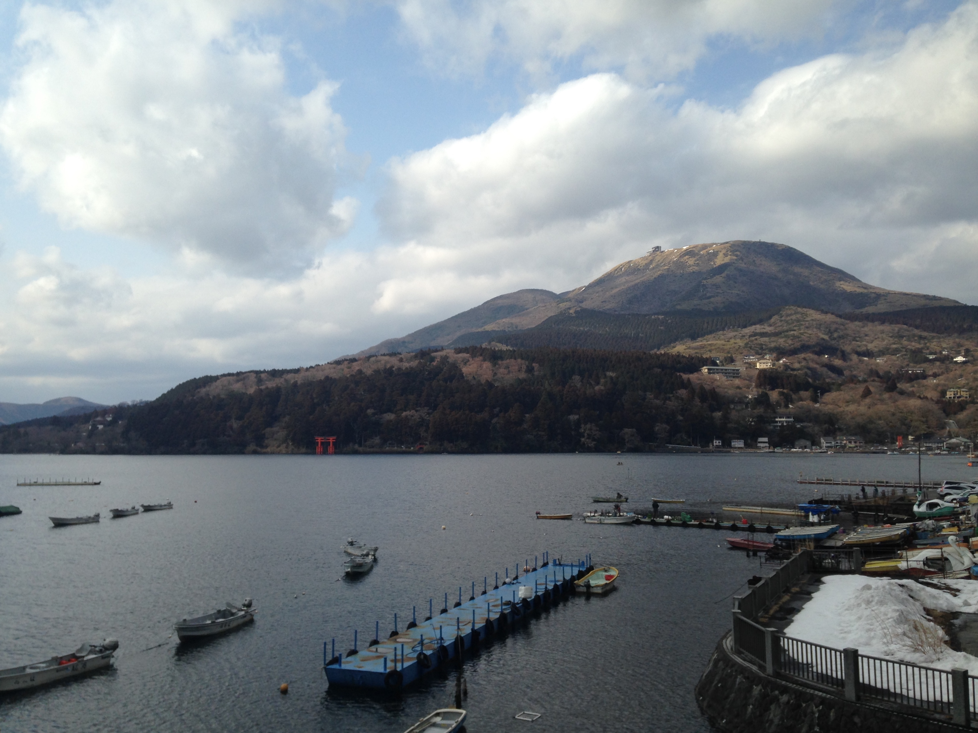 箱根町役場箱根支所より望む芦ノ湖と箱根駒ヶ岳